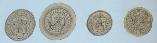 Pečetě města Štětí